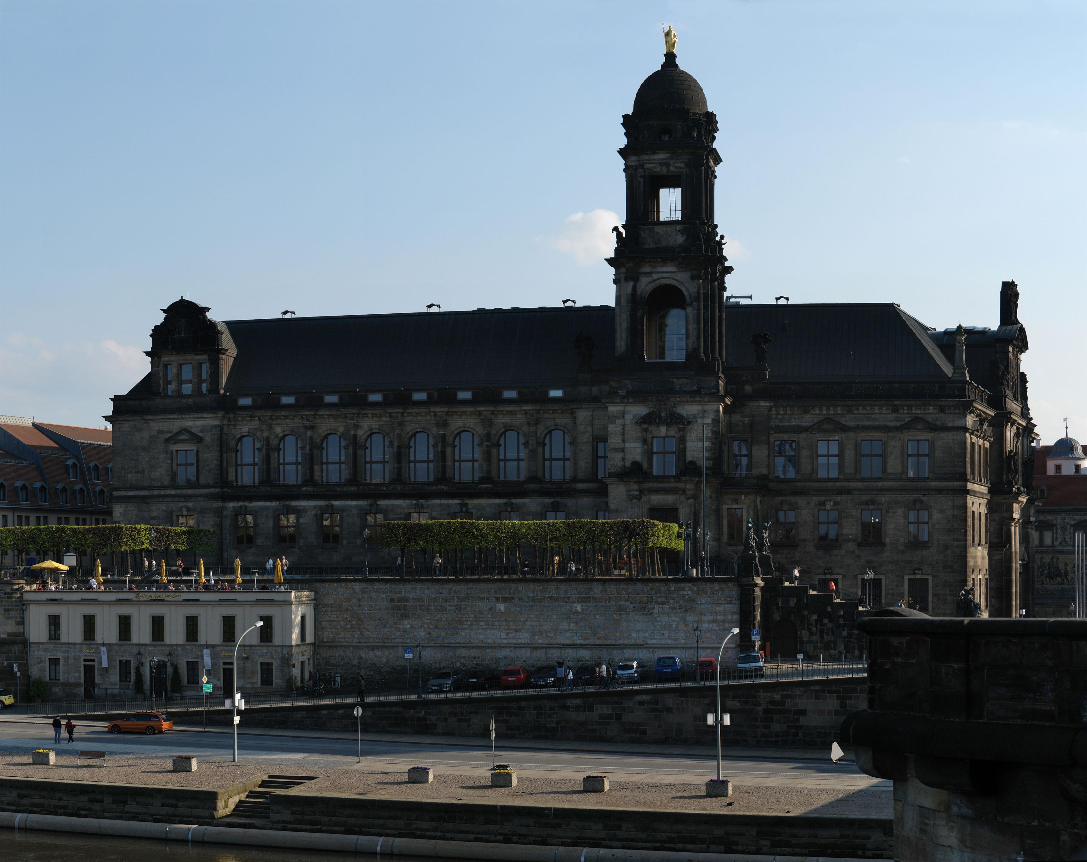 Sächsisches Ständehaus